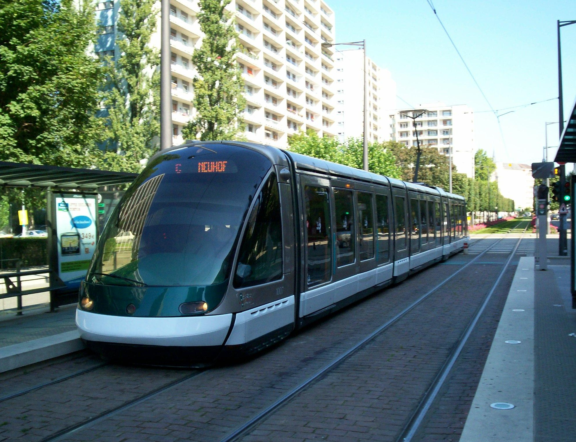 Tramways de Strasbourg Ligne C à Esplanade, alors ancien terminus, le 26 Août 2007, jour de l'inauguration de l'extension du réseau Tramway Strasbourgeois